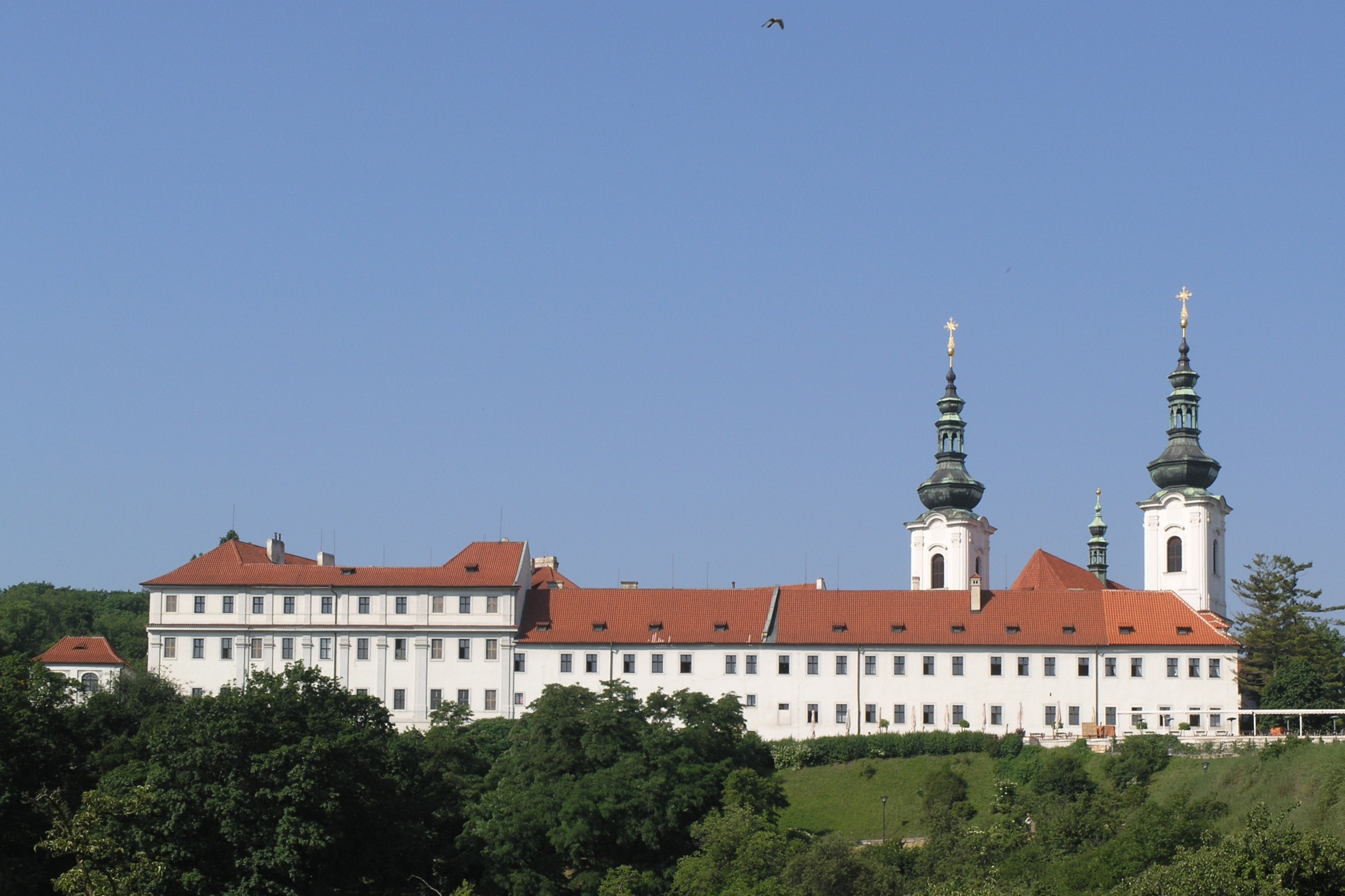 Praha, Hradčany - pohled na Strahovský klášter z ulice Úvoz